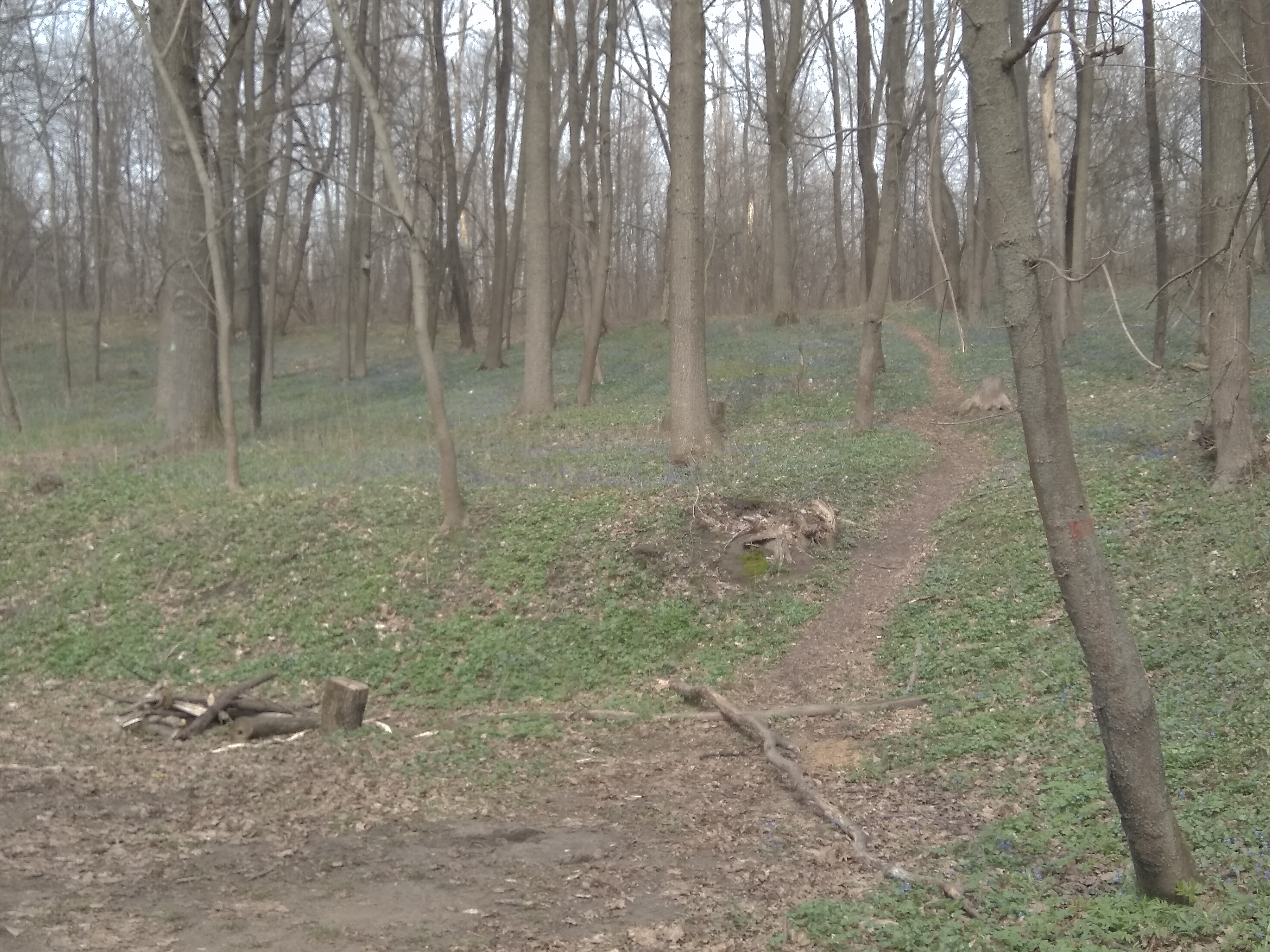 Подснежники в Центральном парке Воронежа